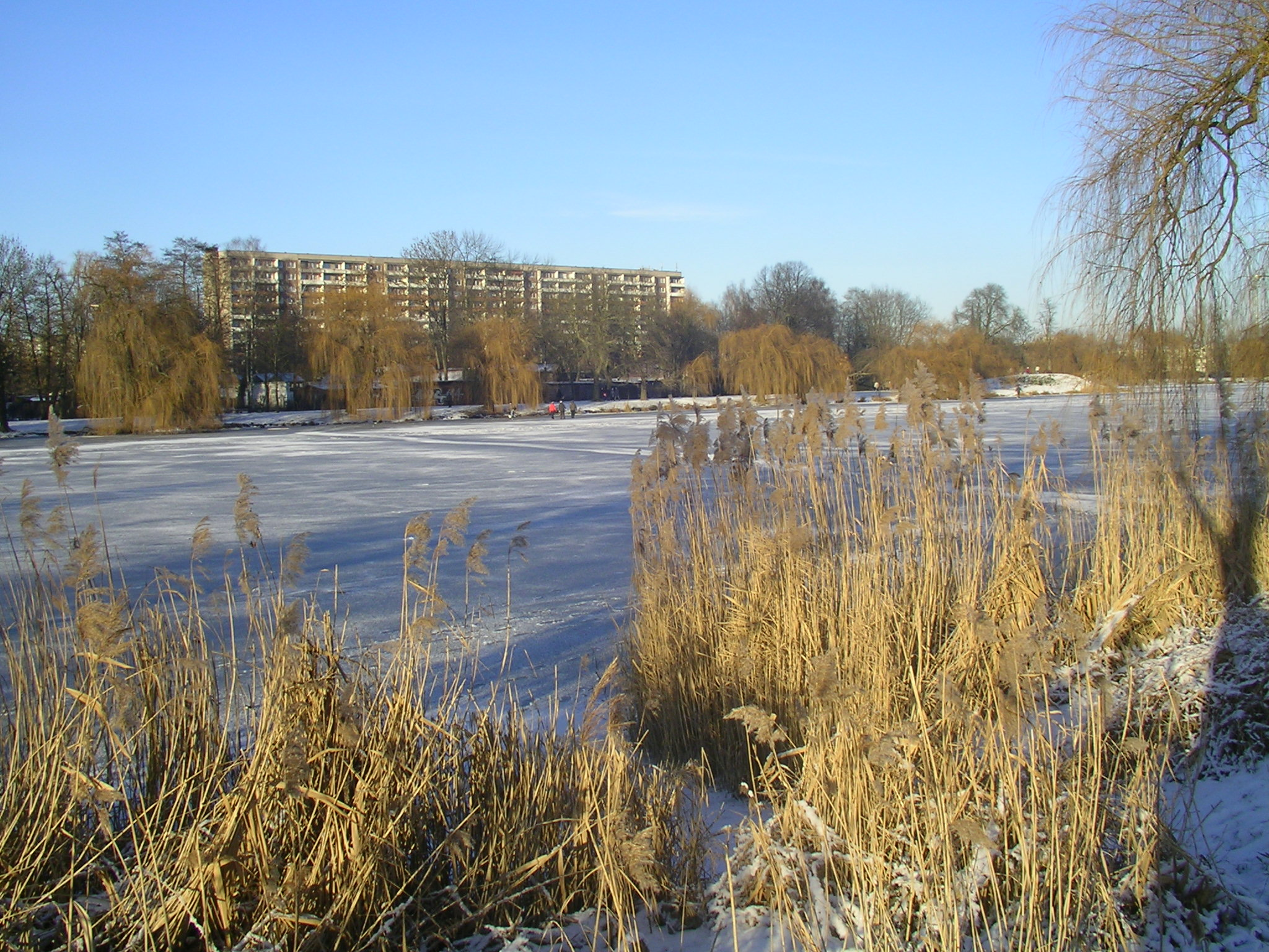 Der zugefrorene Stendaler Stadtsee im Winter.